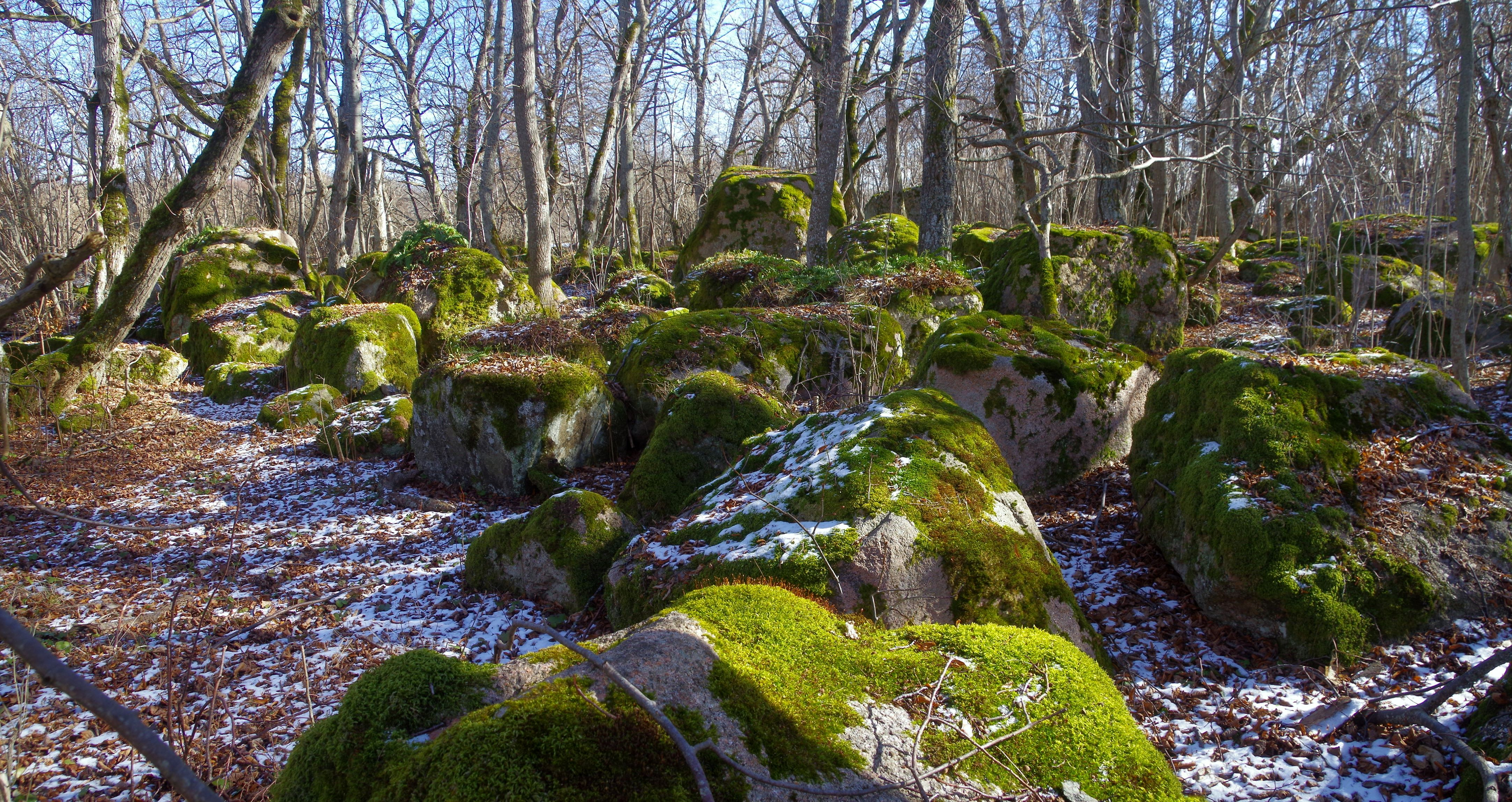 Pakri maastikukaitseala